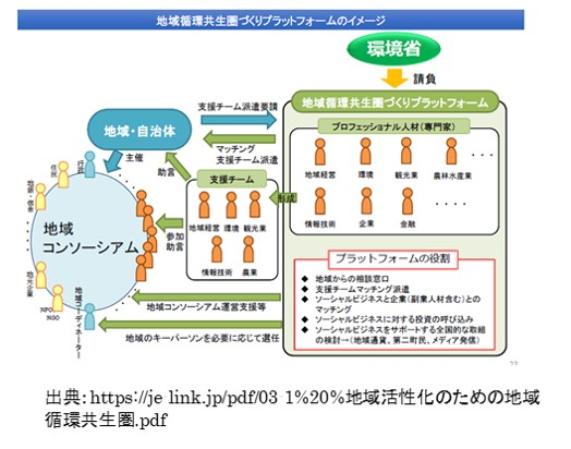 環境省 地域循環共生圏プラットフォーム事業の図